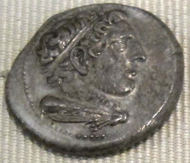 Repubblica, roma, didracma d'argento, 269 ac. ca.